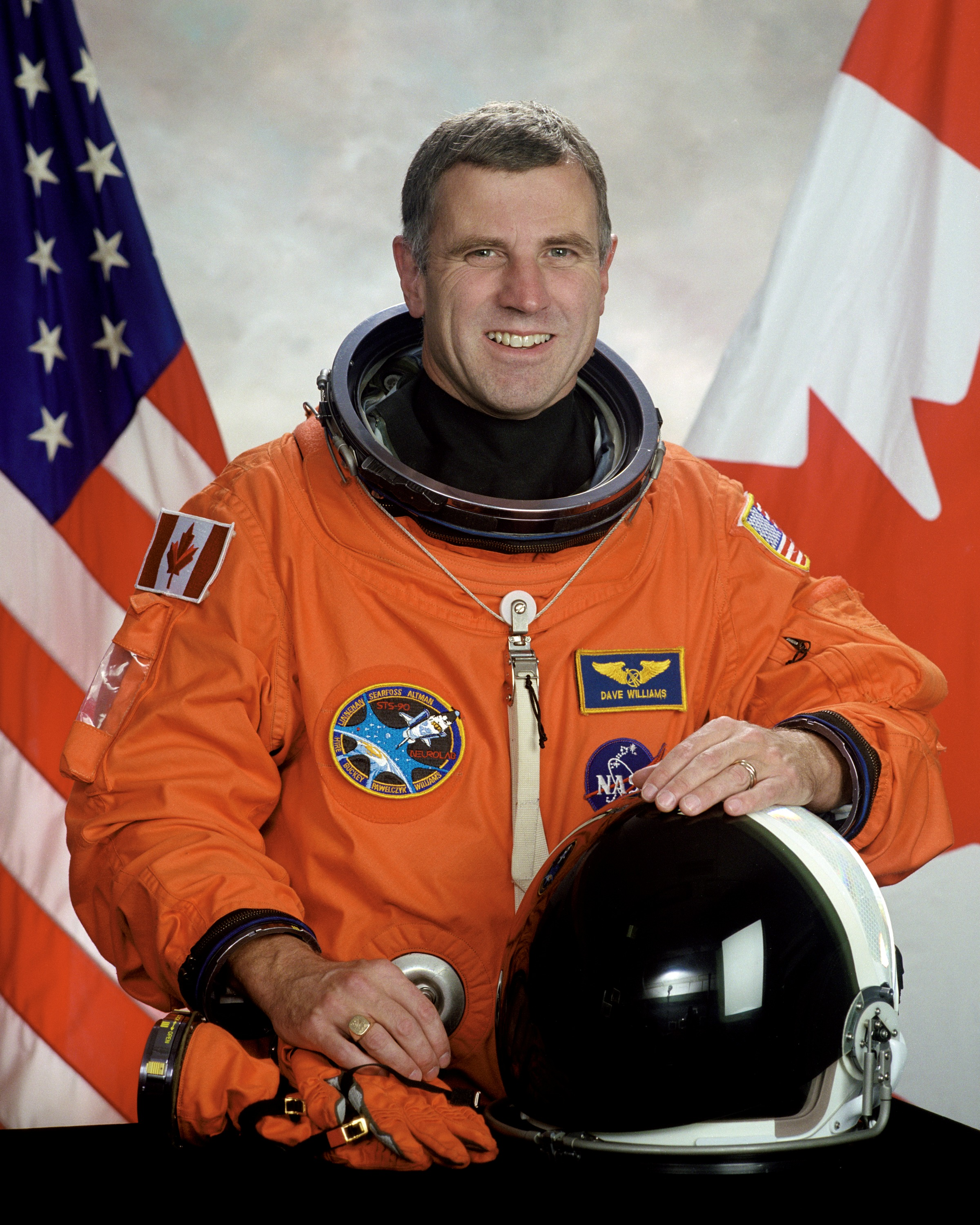 astronaut Dafydd Williams